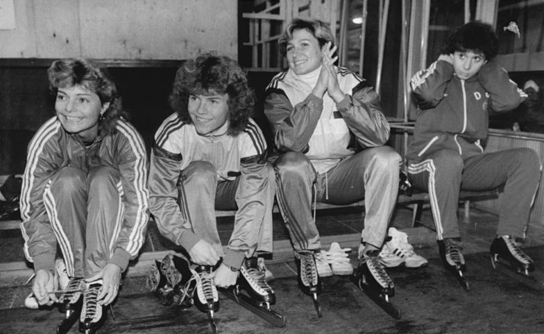 Andrea Ehrig, Gabi Zange, Karin Kania, Sabine Brehm ADN-ZB Oberst 26.11.88 Berlin: Eisschnellauf-Im Rahmen des Eisschnellauf-Weltcups der Frauen verabschiedeten sich die bekannten Eisschnelläuferinnen Andrea Ehrig, Gabi Zange, Karin Kania und Sabine Brehm (vlnr) vom aktiven Sport.